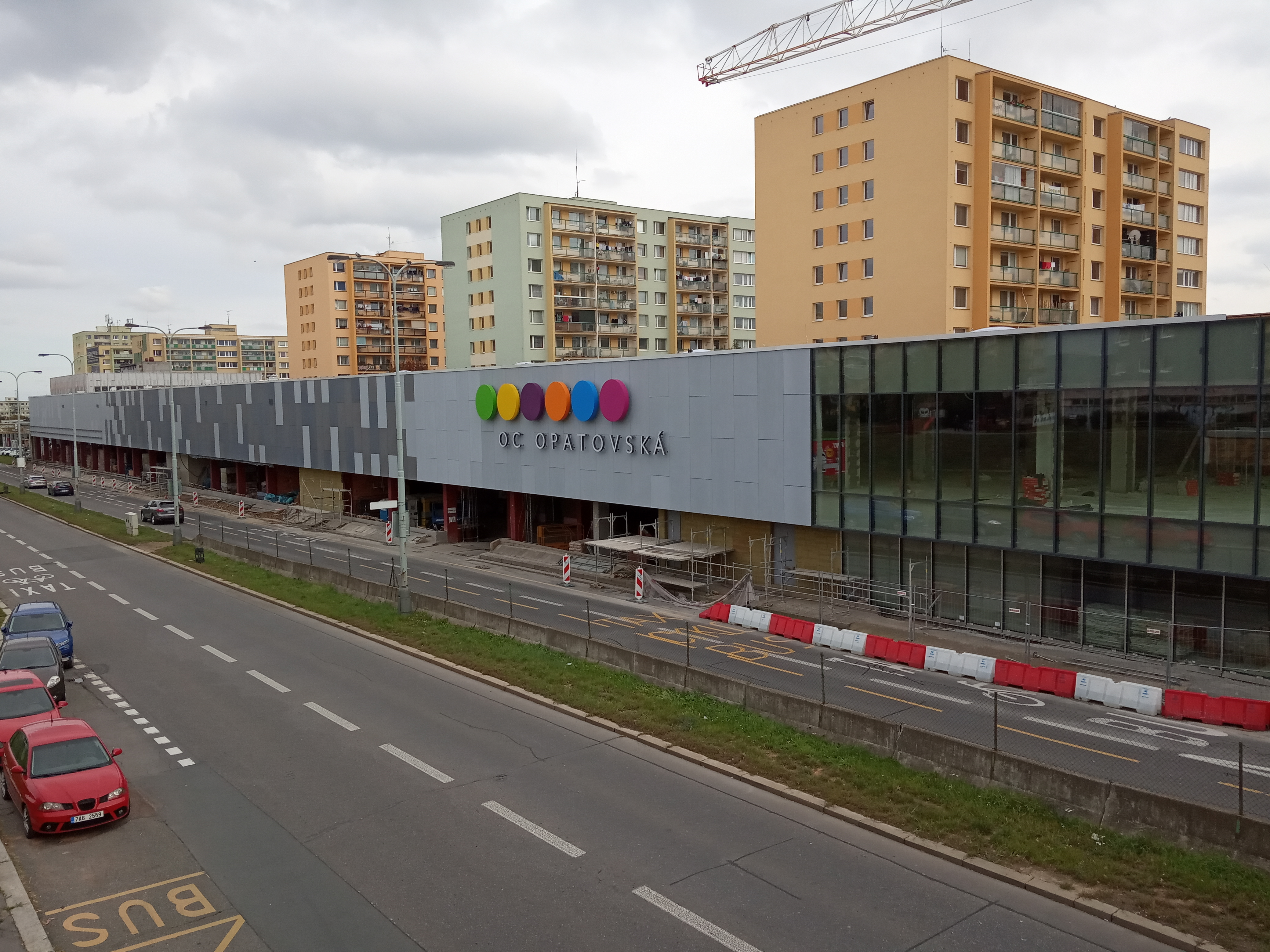 Praha - Chodov, Opatovská 12, stavba OC Opatovská